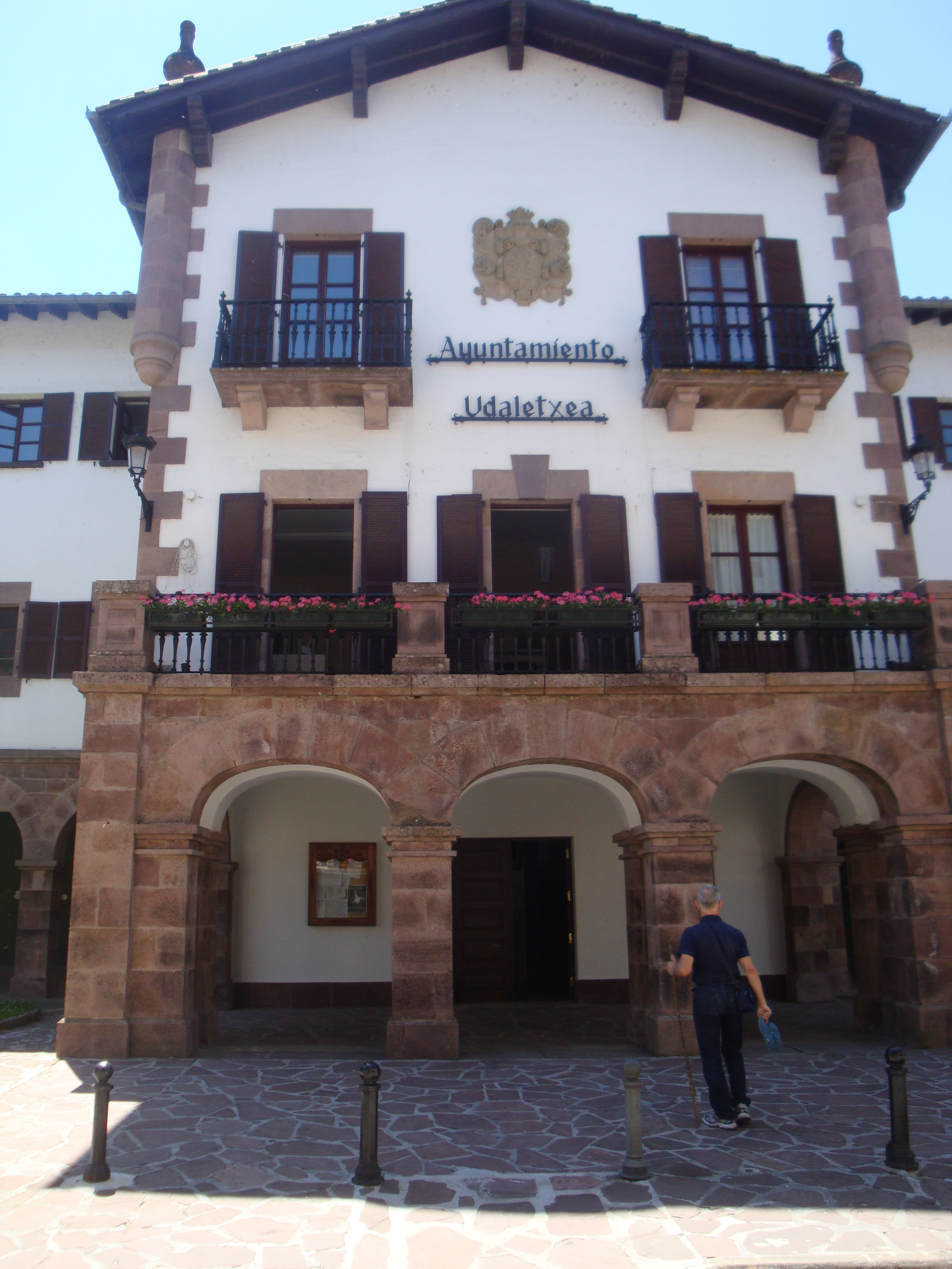 Doneztebeko udaletxea (Nafarroa, Euskal Herria)